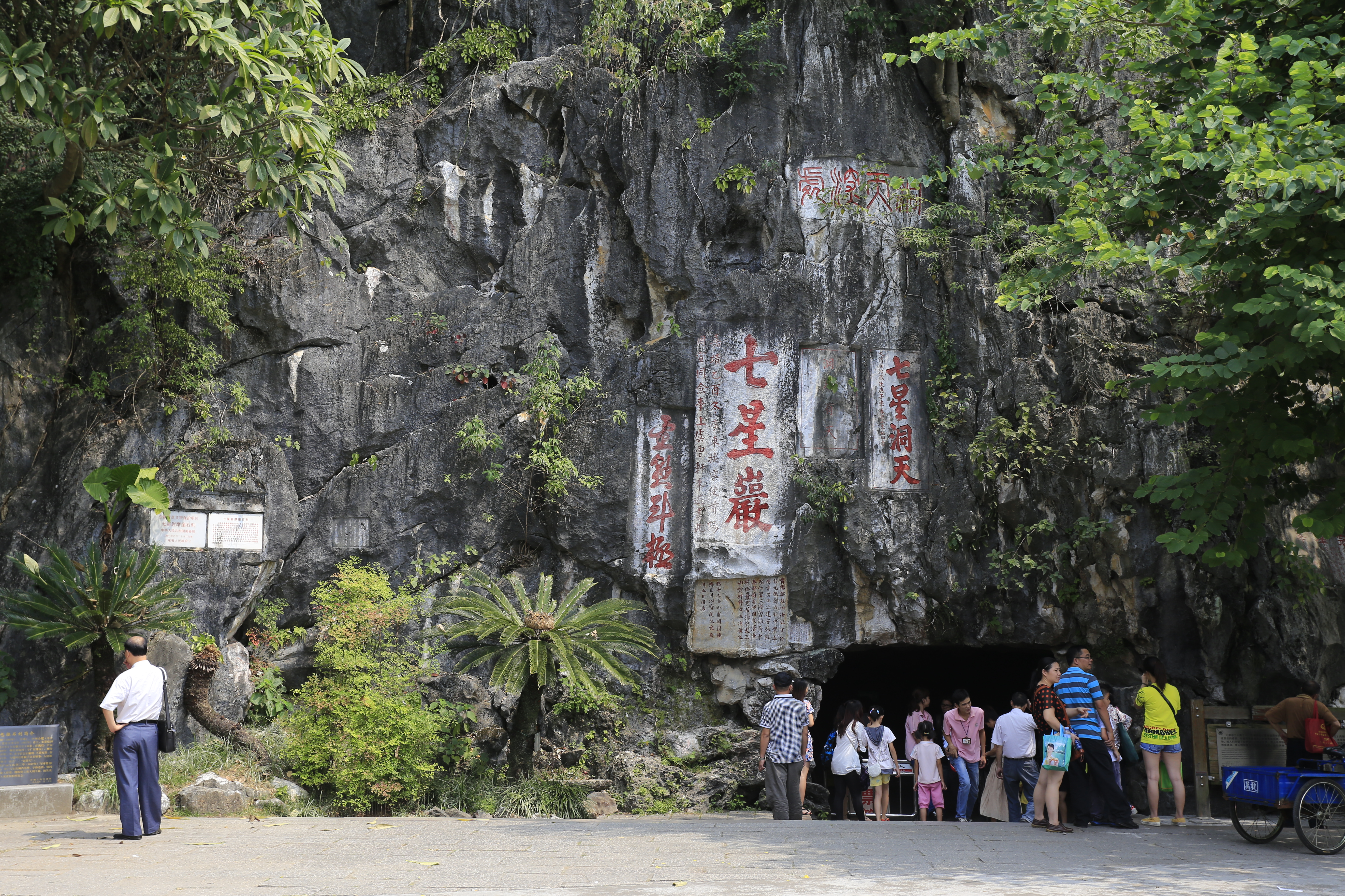 肇庆七星岩摩崖石刻